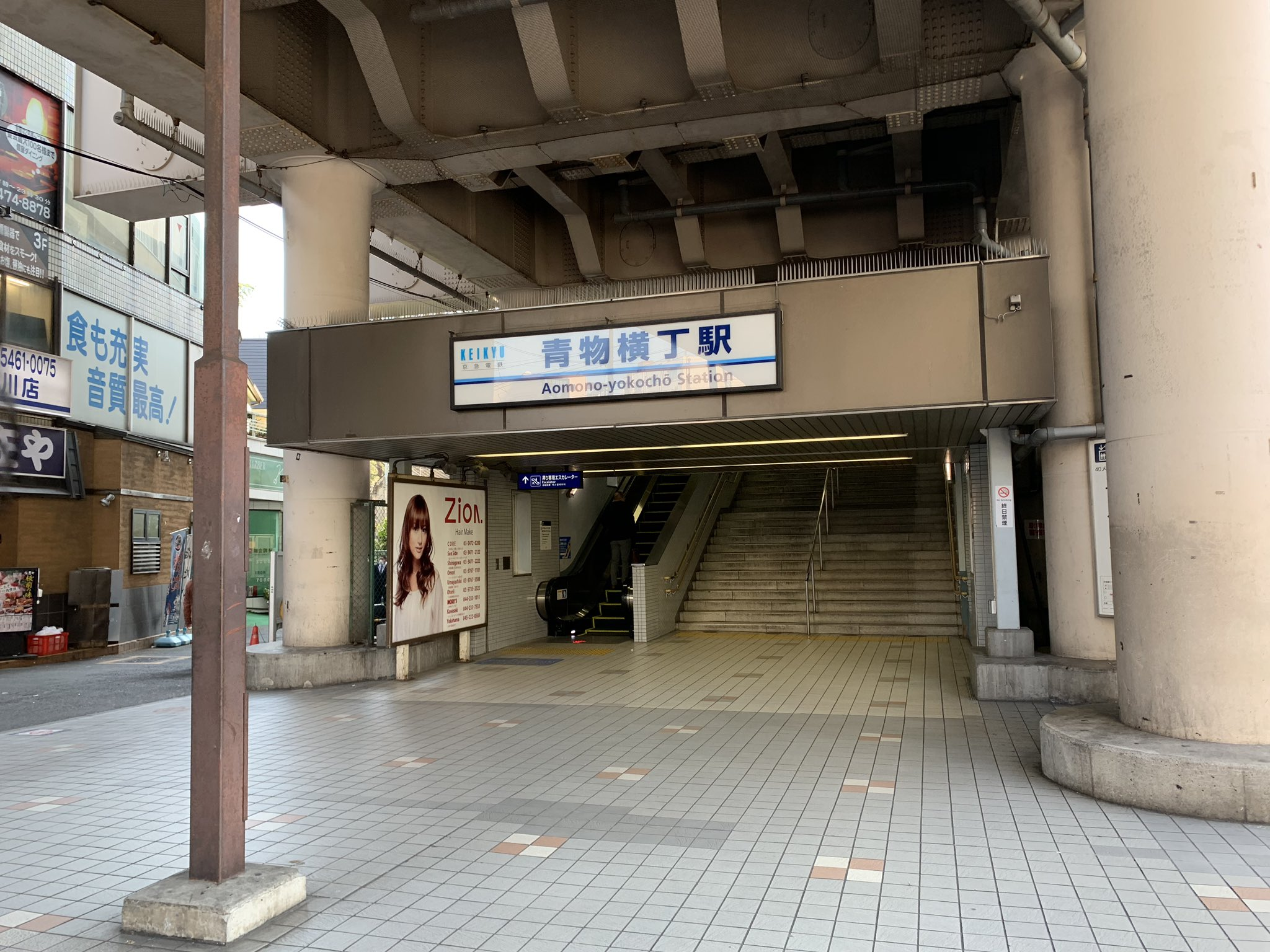 青物横丁駅